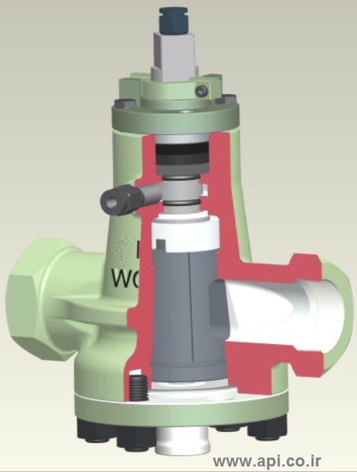 تصویر اموزشی - شیر سماوری از نوع بالانس شونده با فشار